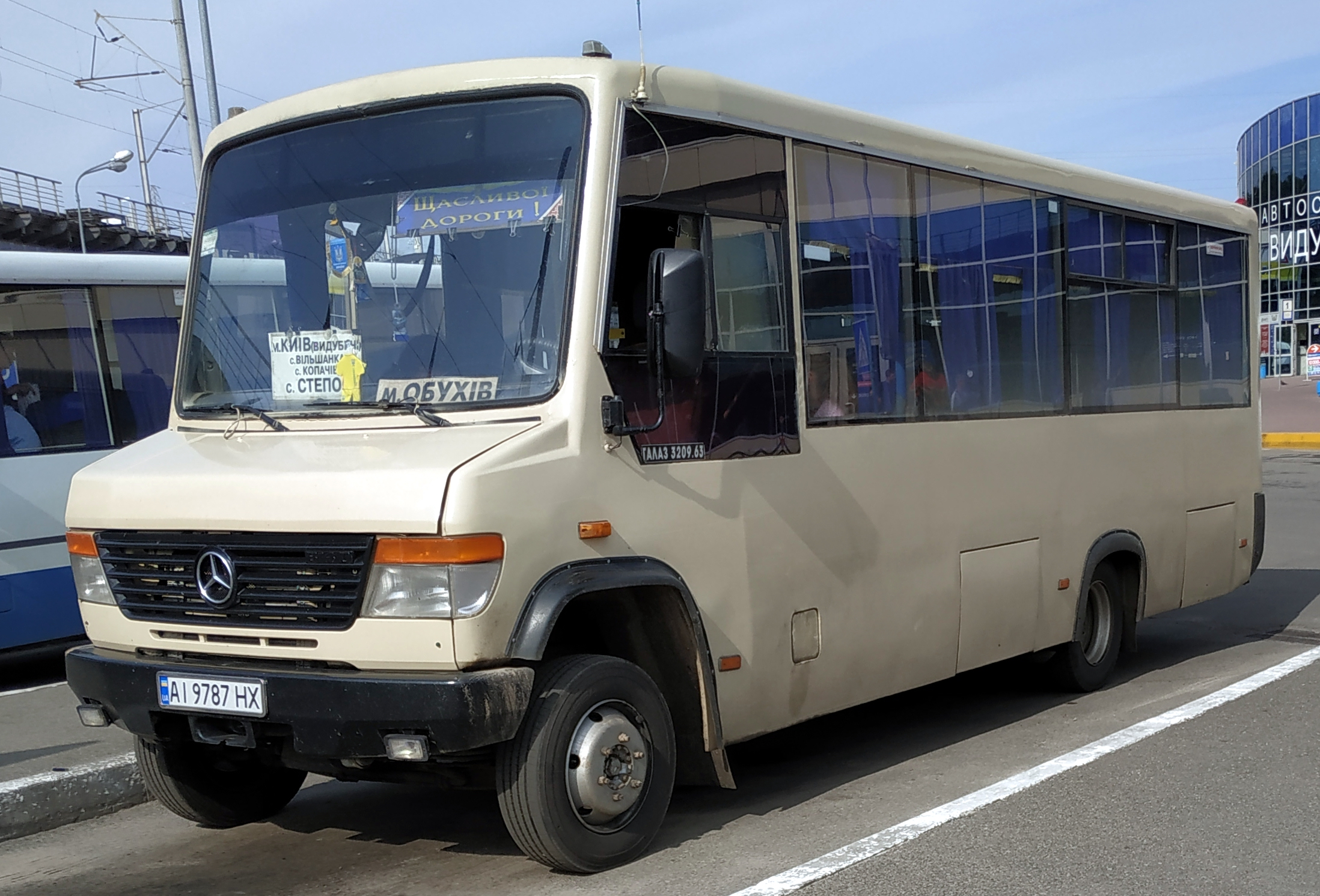 Автобус ГалАЗ-3209.63, Киев, автостанция Выдубичи, 2019 г.